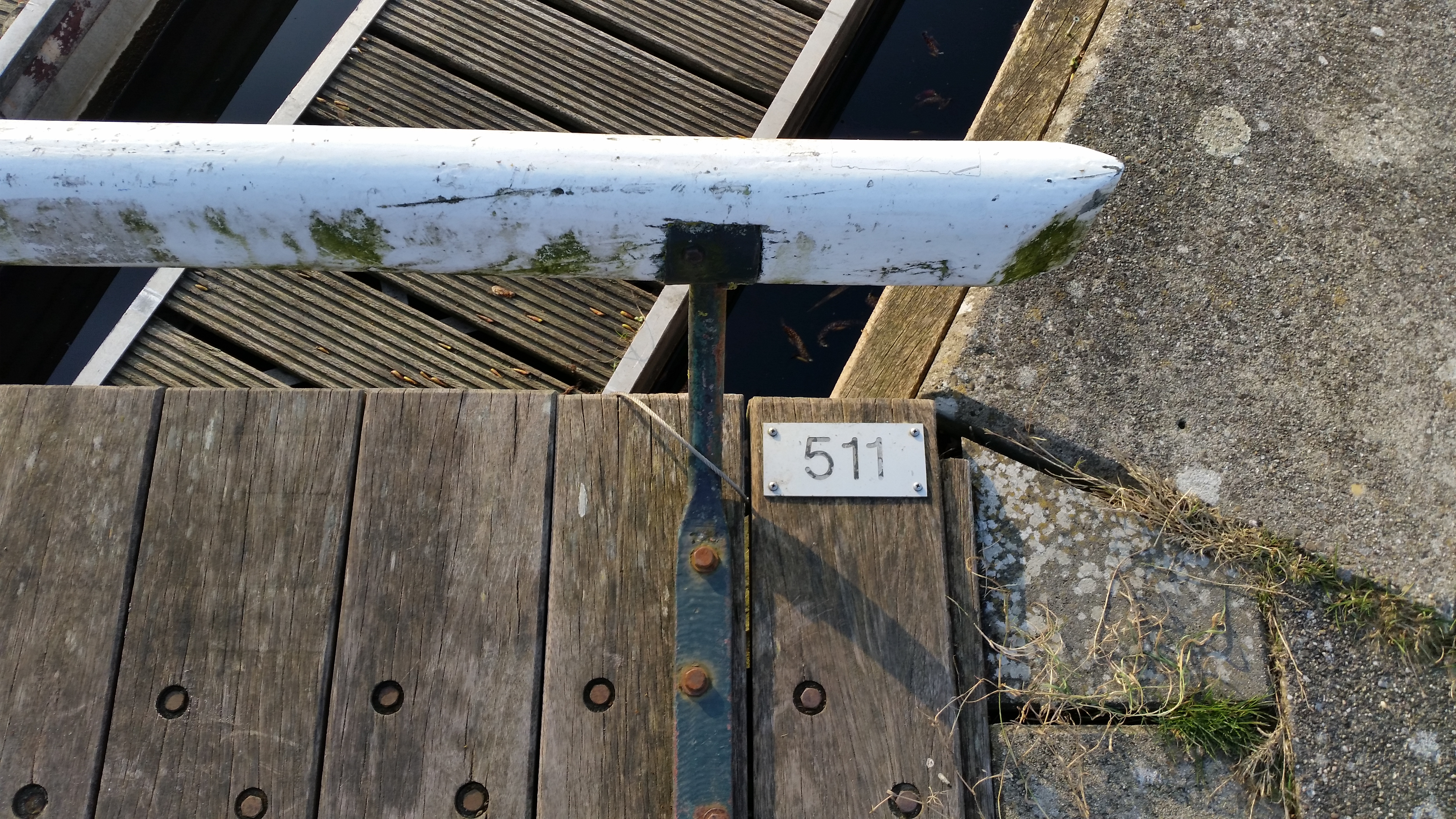 Nummerplaatje van Brug 511 (in Amsterdam)